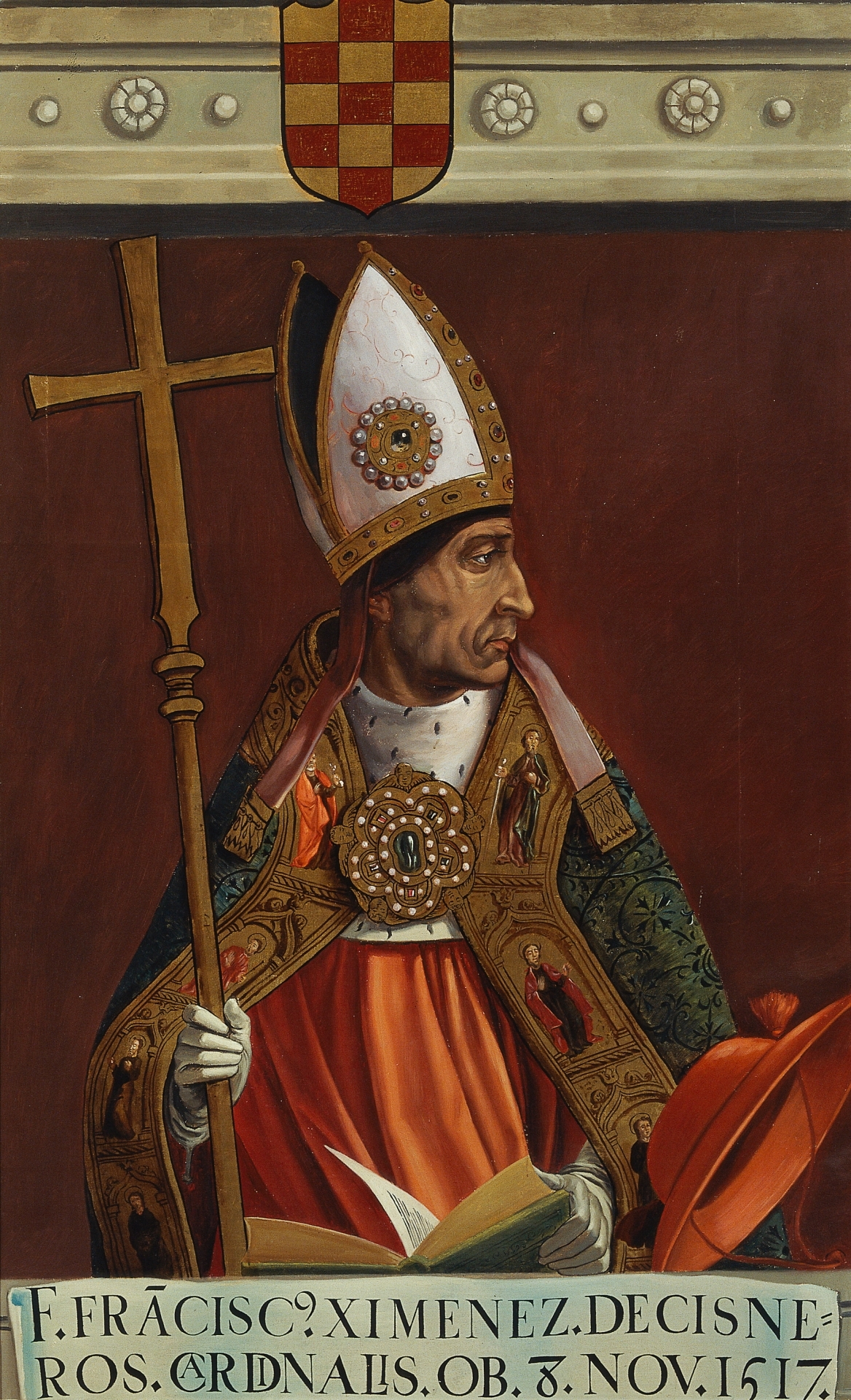 Retrato del eclesiástico español Francisco Jiménez de Cisneros (1436-1517), que llegó a ser cardenal de la Iglesia Católica, arzobispo de Toledo, Primado de España, canciller mayor de Castilla, presidente del Consejo de Regencia de Castilla y gobernador del reino de Castilla. Esta obra es una copia decimonónica del retrato del arzobispo pintado por Juan de Borgoña y conservado en la Sala capitular de la Catedral de Toledo.